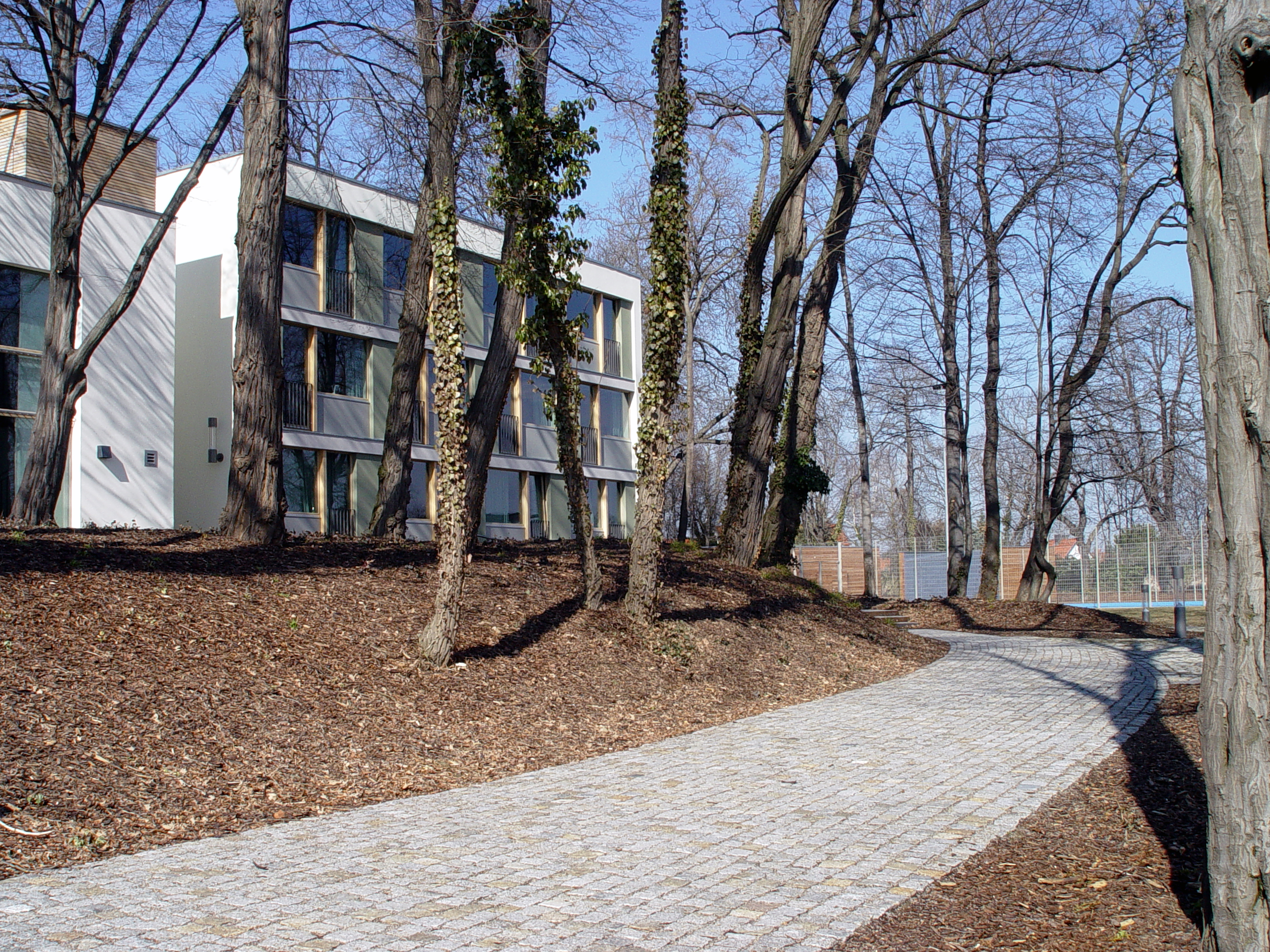 Der Weg ins Oberstufendorf des sächsischen Landesgymnasiums Sankt Afra